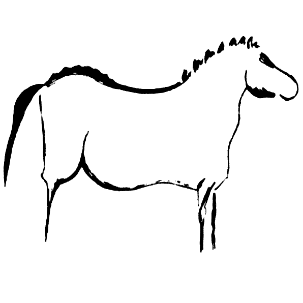 Caballo pintado en negro con trazo modelante del panel número 51, de la Galería B (segundo santuario) de la Cueva de La Pasiega, en el monte Castillo, localidad de Puente Viesgo (Cantabria, España)